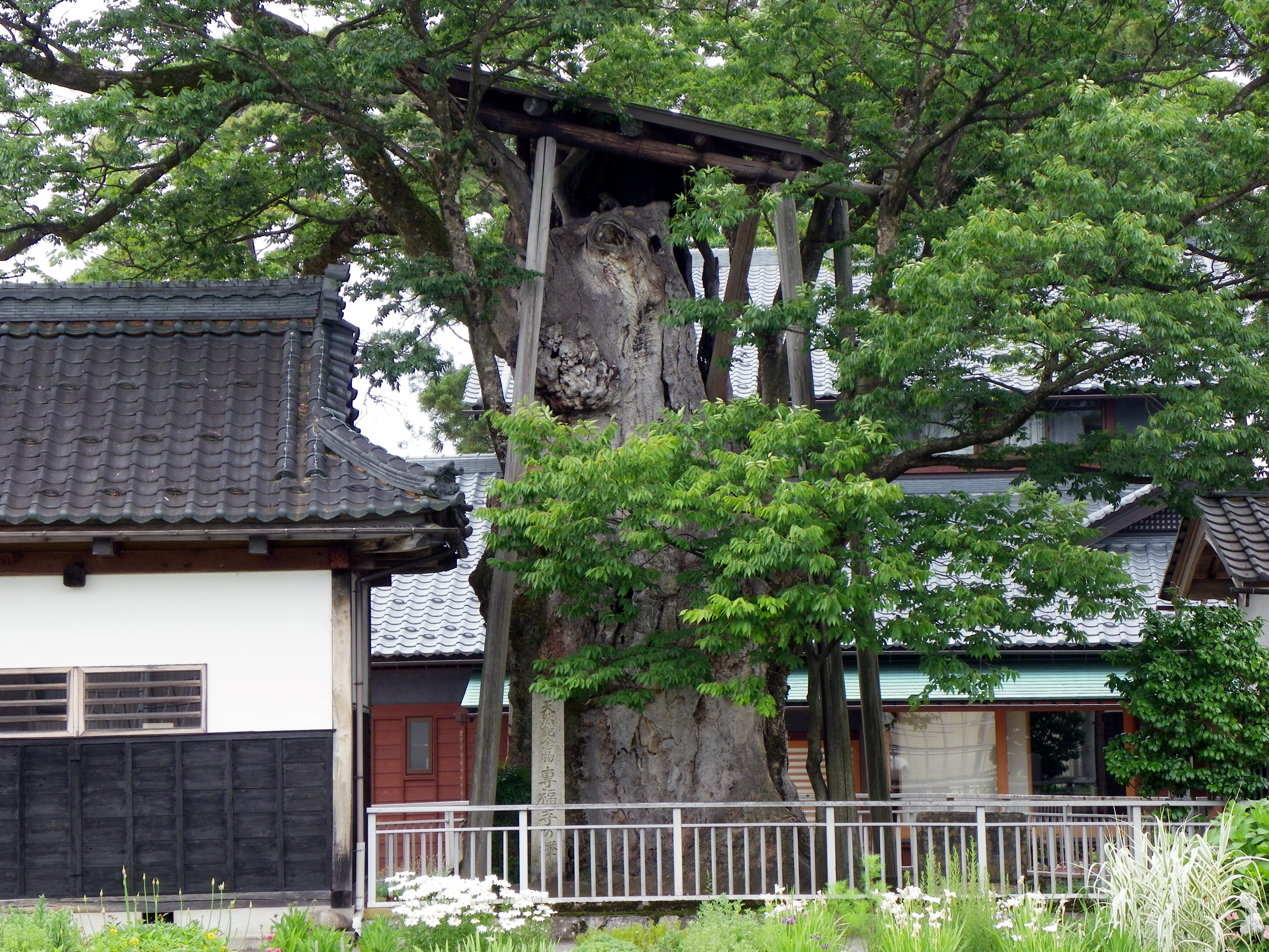 福井県 泉福寺の大ケヤキ